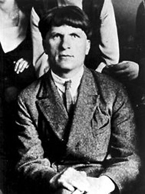 Ukrainian artist, Ivan Padalka (1894-1937)